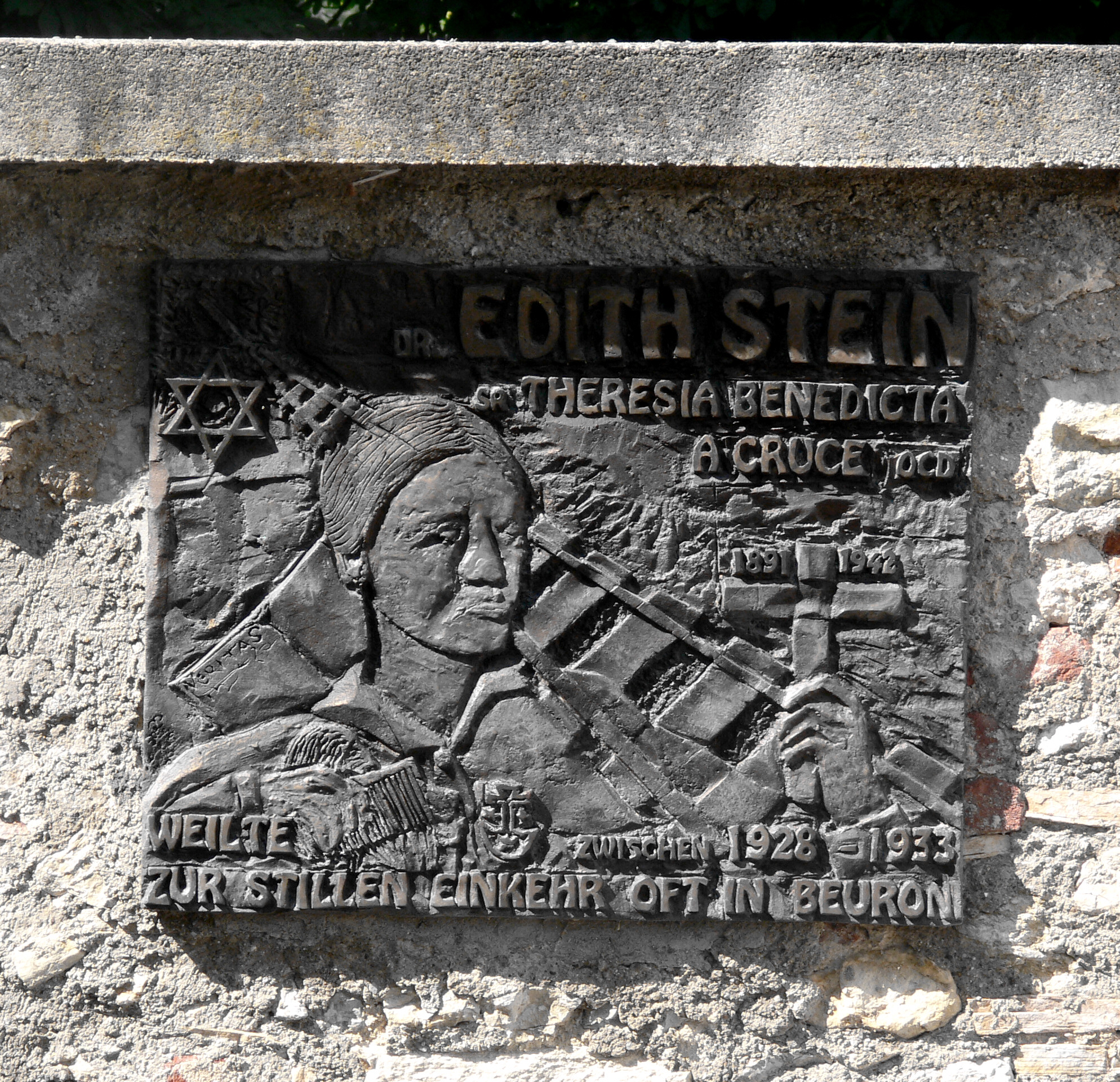 Gedenktafel für Edith Stein auf dem Vorplatz der Abteikirche Beuron